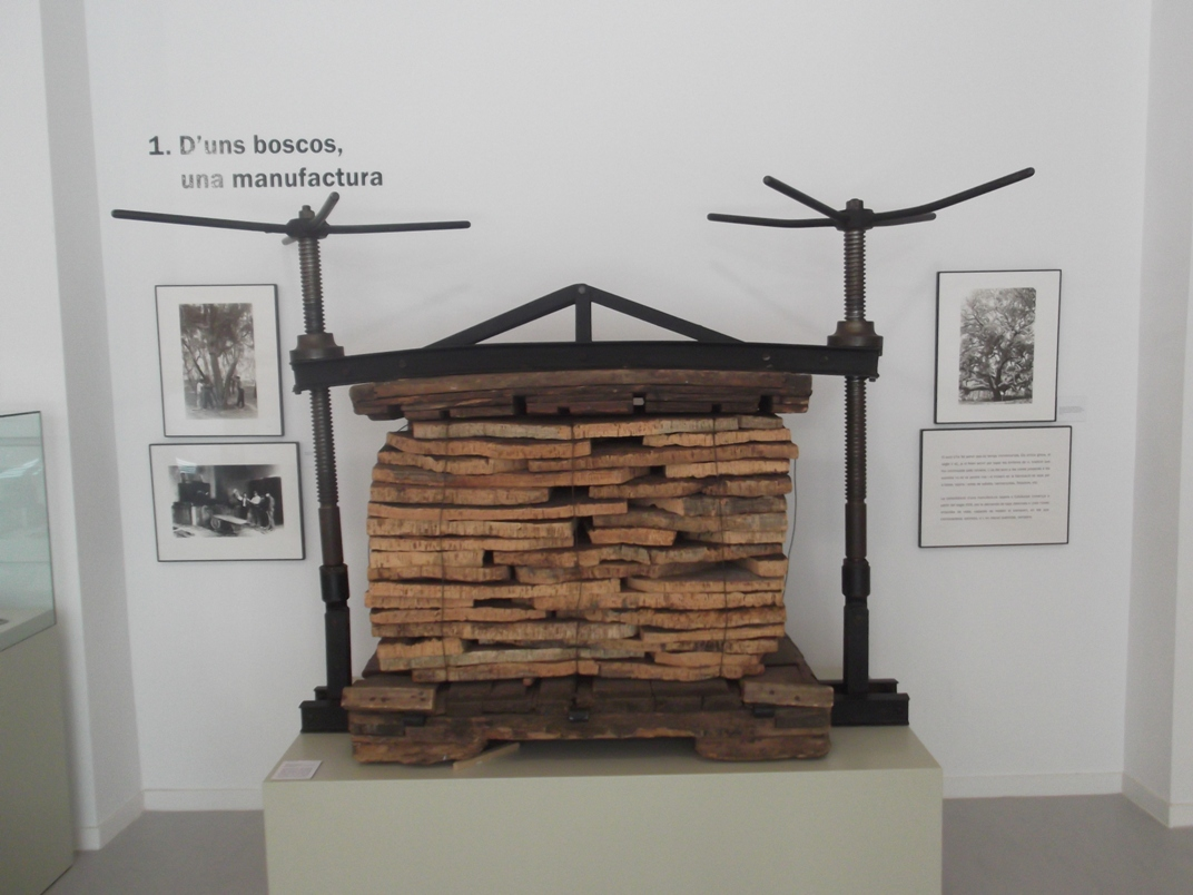 Premsa d'enfardar al Museu del Suro de Palafrugell